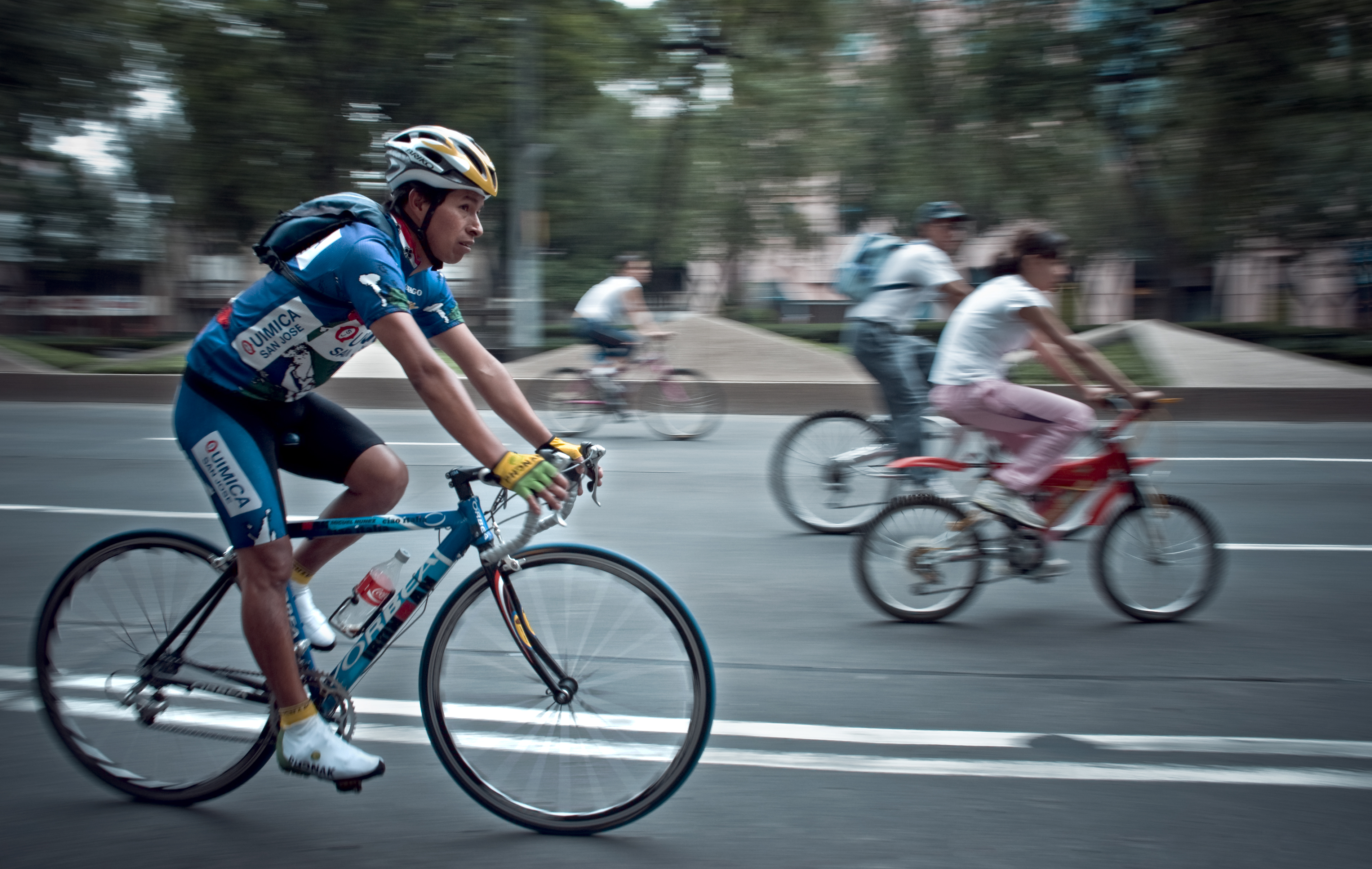 Resulta que, a los paseos dominicales, también van profesionales a entrenarse, dejando atrás a las familias, a las parejas, a los niños... Atrás.